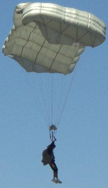 un paracaidista realizando una demostración